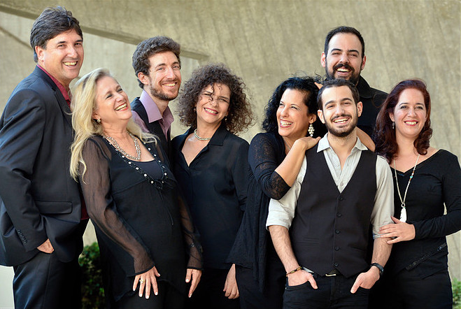 שמיניית ווקאל אחרי הופעה במרכז אמנויות, מלון אלמא בזכרון יעקב חברי השמינייה משמאל לימין: רון גנג, רונית כץ, ארז טל, אורלי מזור-יובל, יסמין גמליאל, עידן ששון, דורון דר, מיכל סנש-אלקן